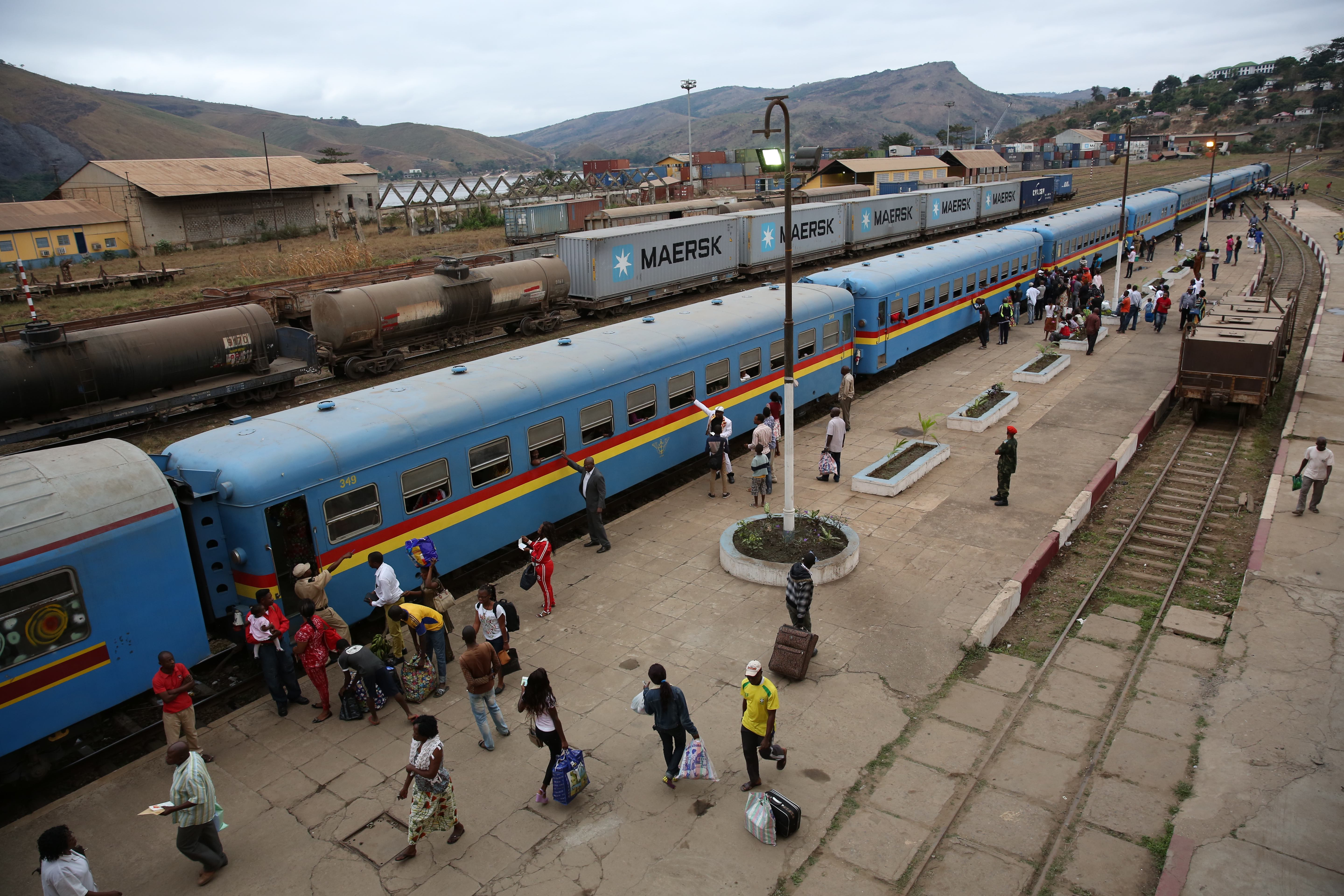 Photo MONUSCO / Abel Kavanagh